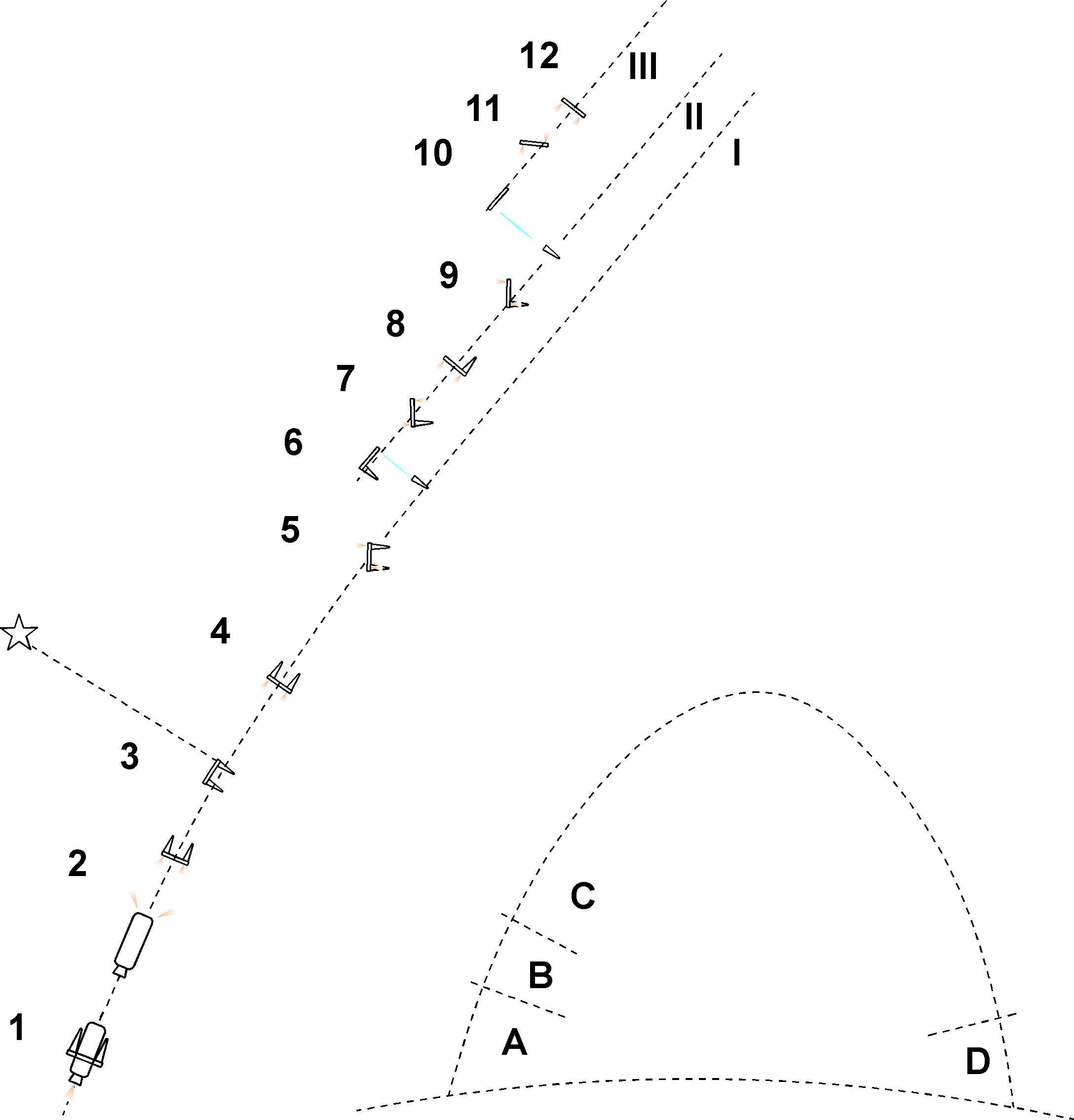 Схема полета ракеты Трайдент 2 на участке разведения боевых блоков.